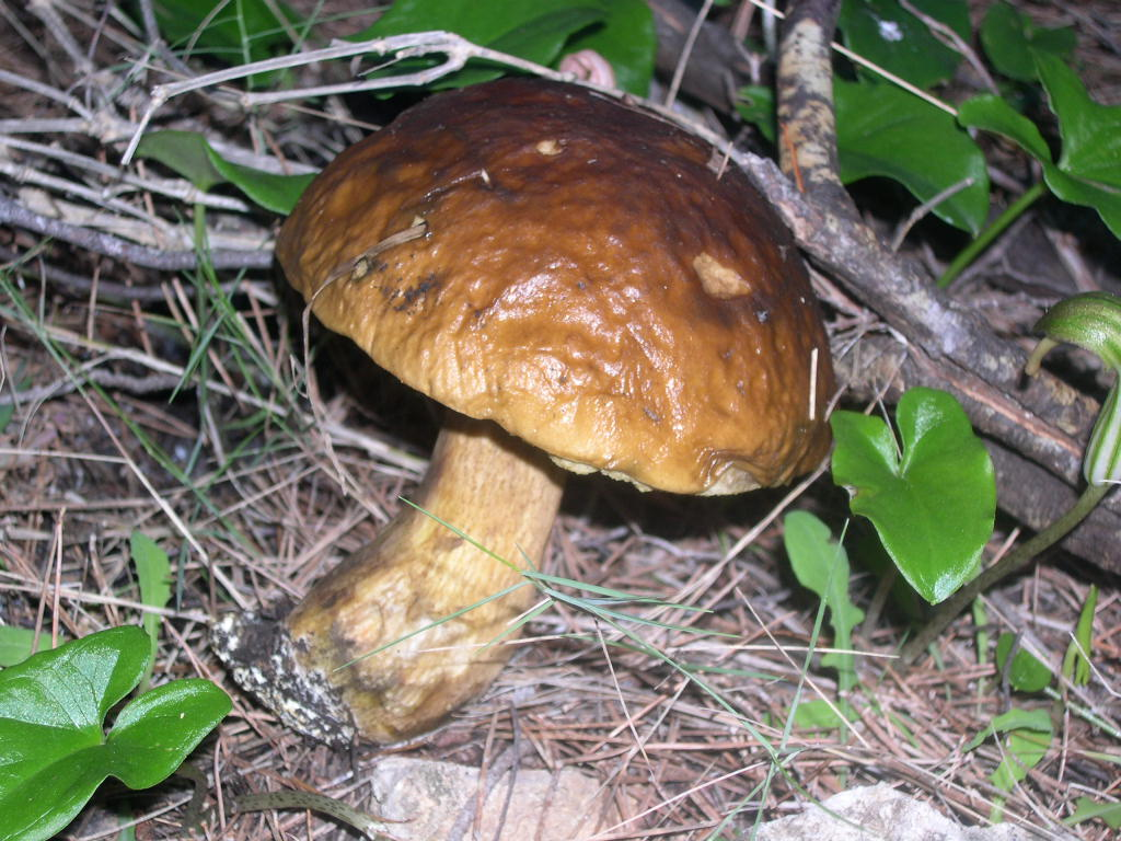 Pixacà (Leccinum lepidum), Mallorca.